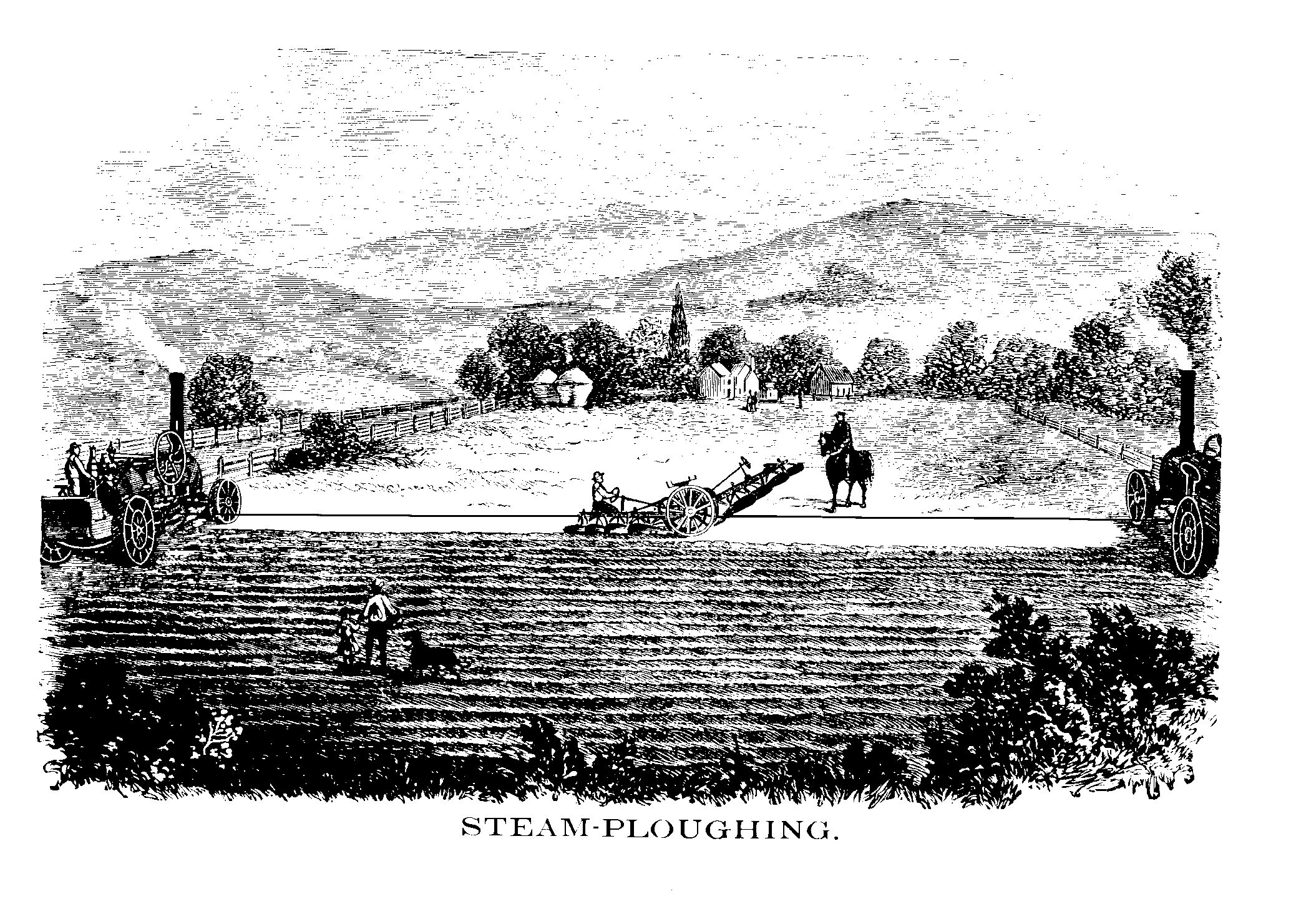 Dibujo de un arado a vapor sistema Fowler